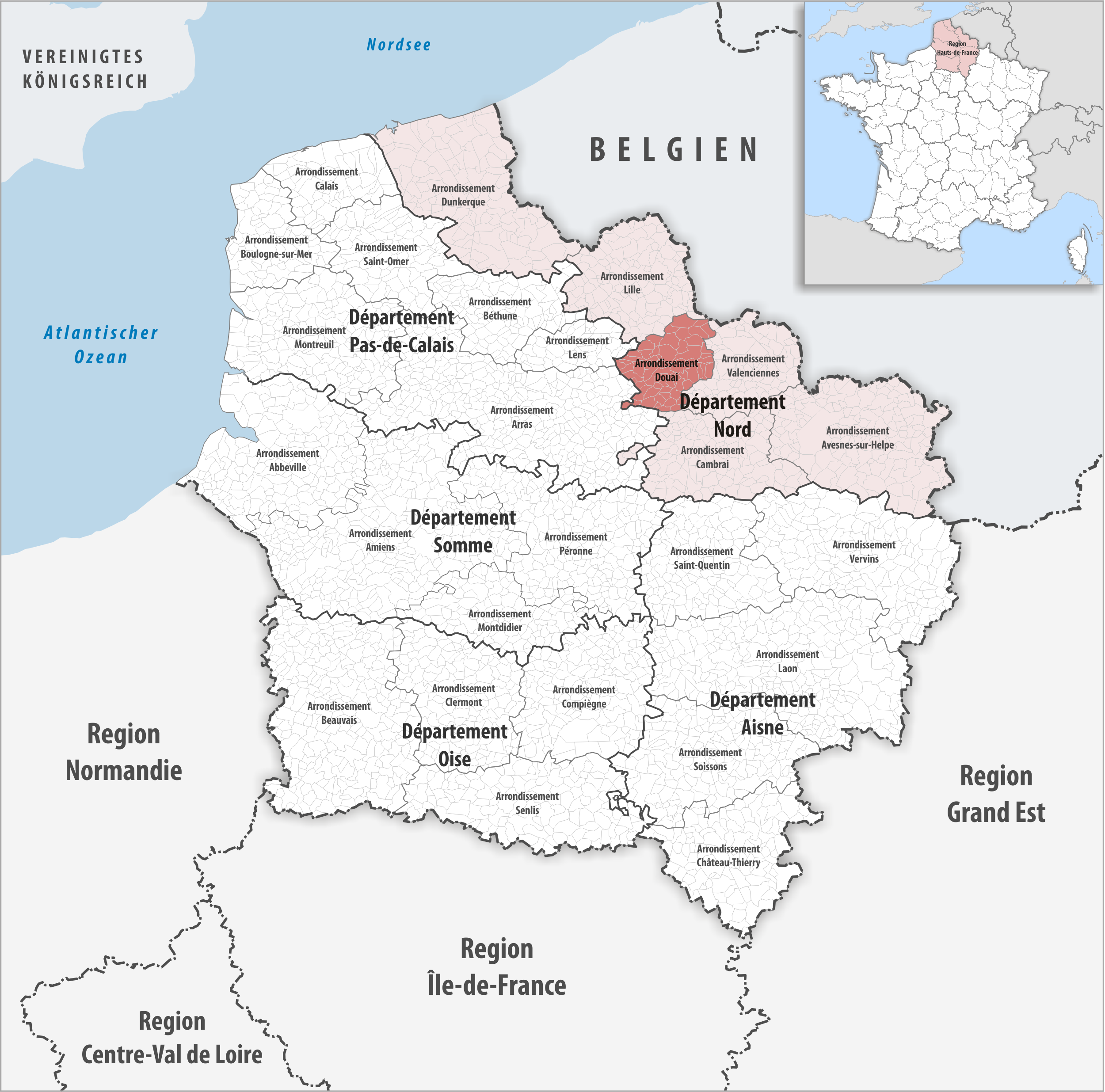 Lage des Arrondissements Douai